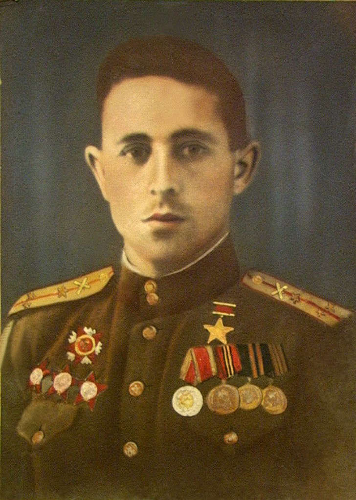 Հայրենական մեծ պատերազմի հերոս՝ Վարդումյանների տոհմից